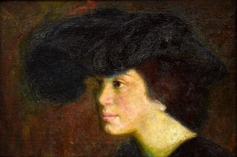 Portret Meli Muter